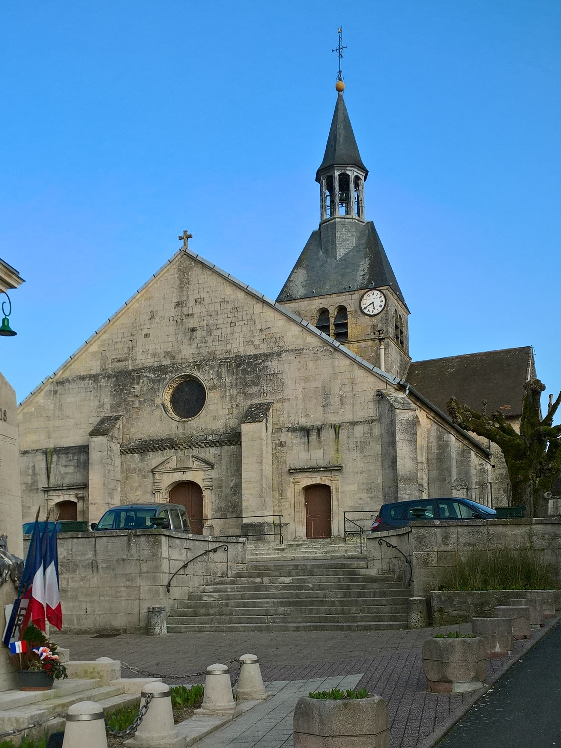 Dommartin-le-Saint-Père, église Saint-Martin.